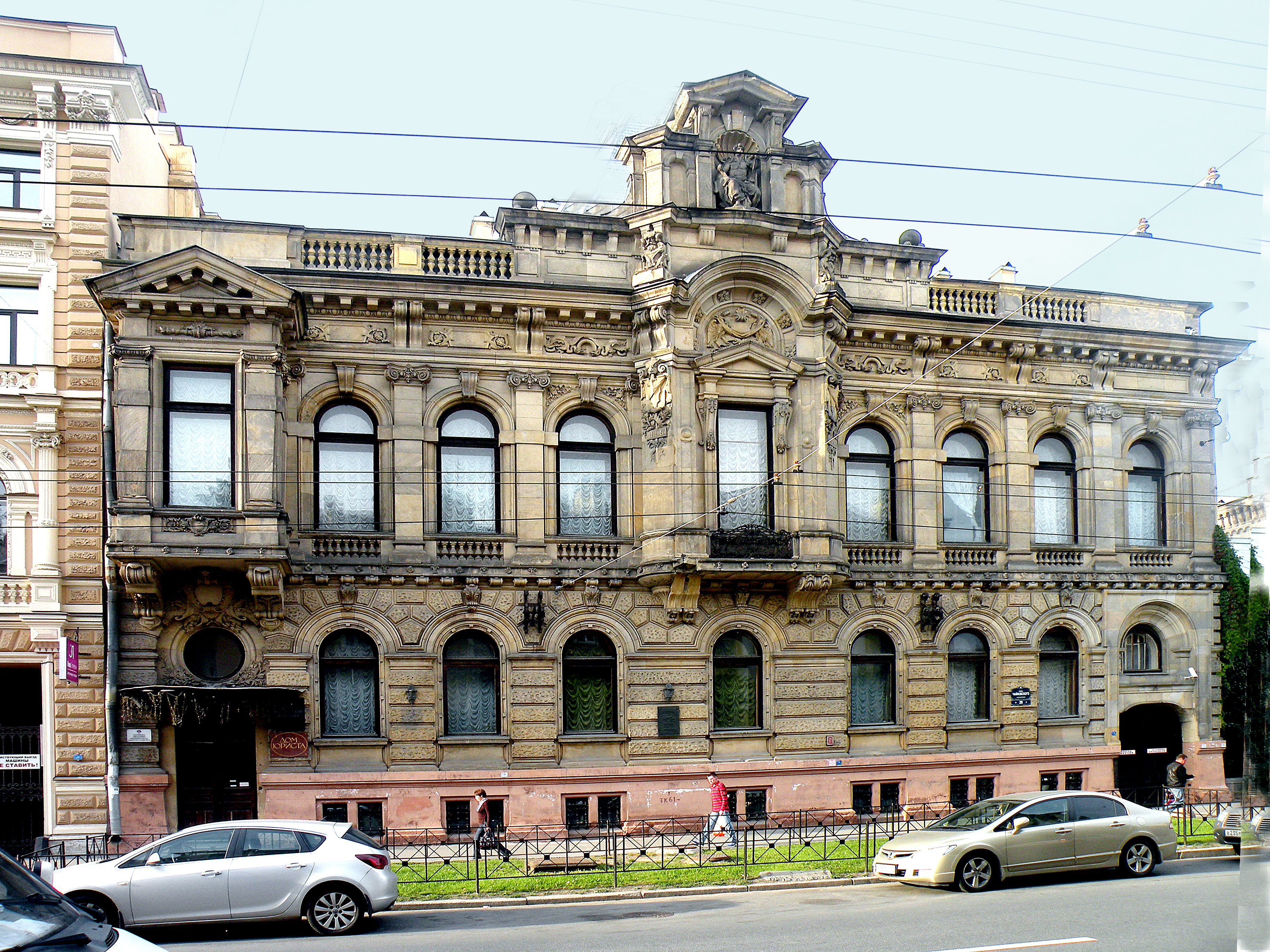 Шене Василий Иванович (1867 - после 1934) Чайковского 28.Особняк Кельха